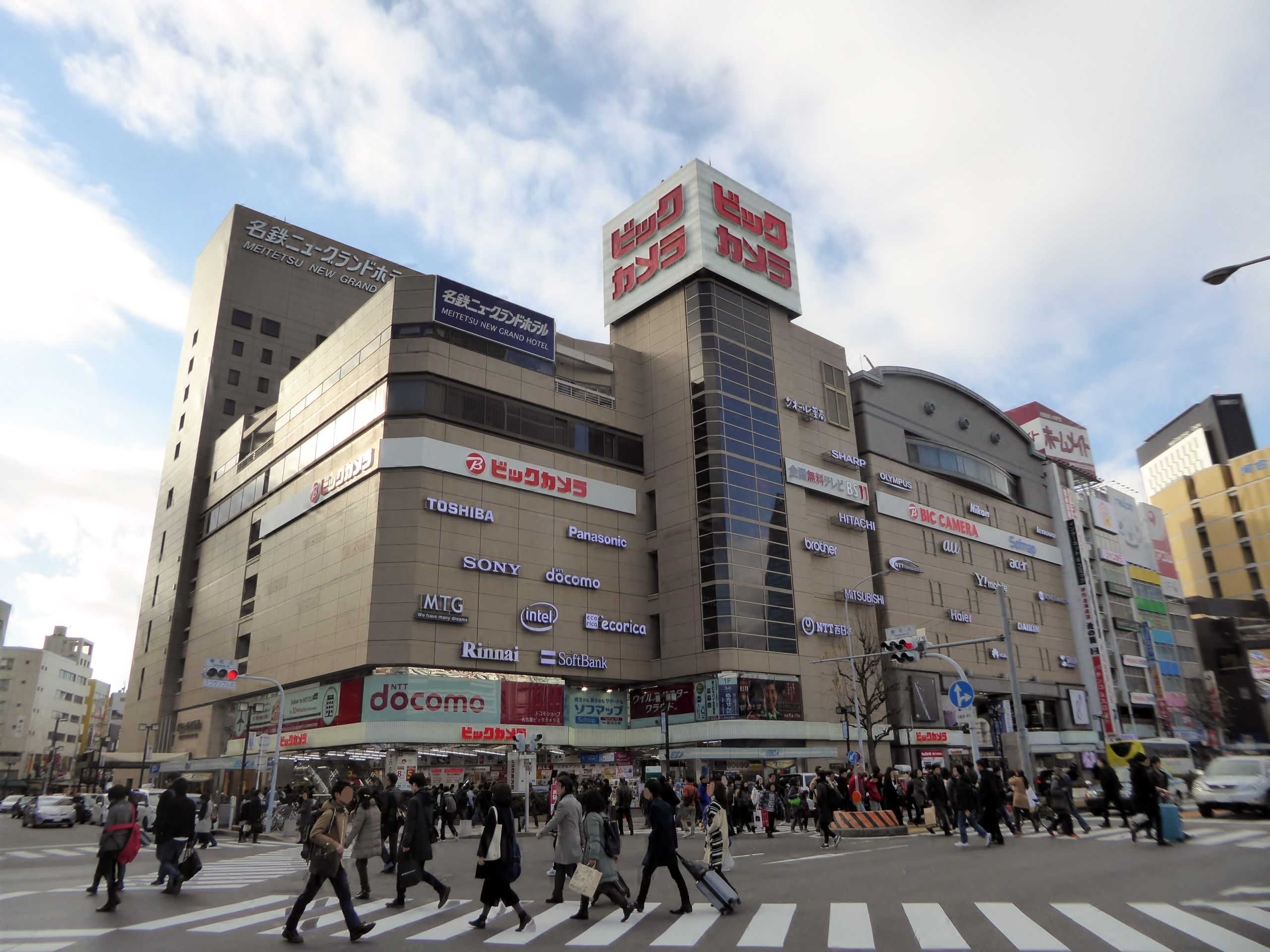 ビックカメラ名古屋駅西店を撮影。